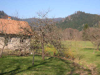 Vescemont (90) paysage, montagne et maison Photo prise le 30/3/2004 par LP90 Licence GFDL LP90 30/3/2004